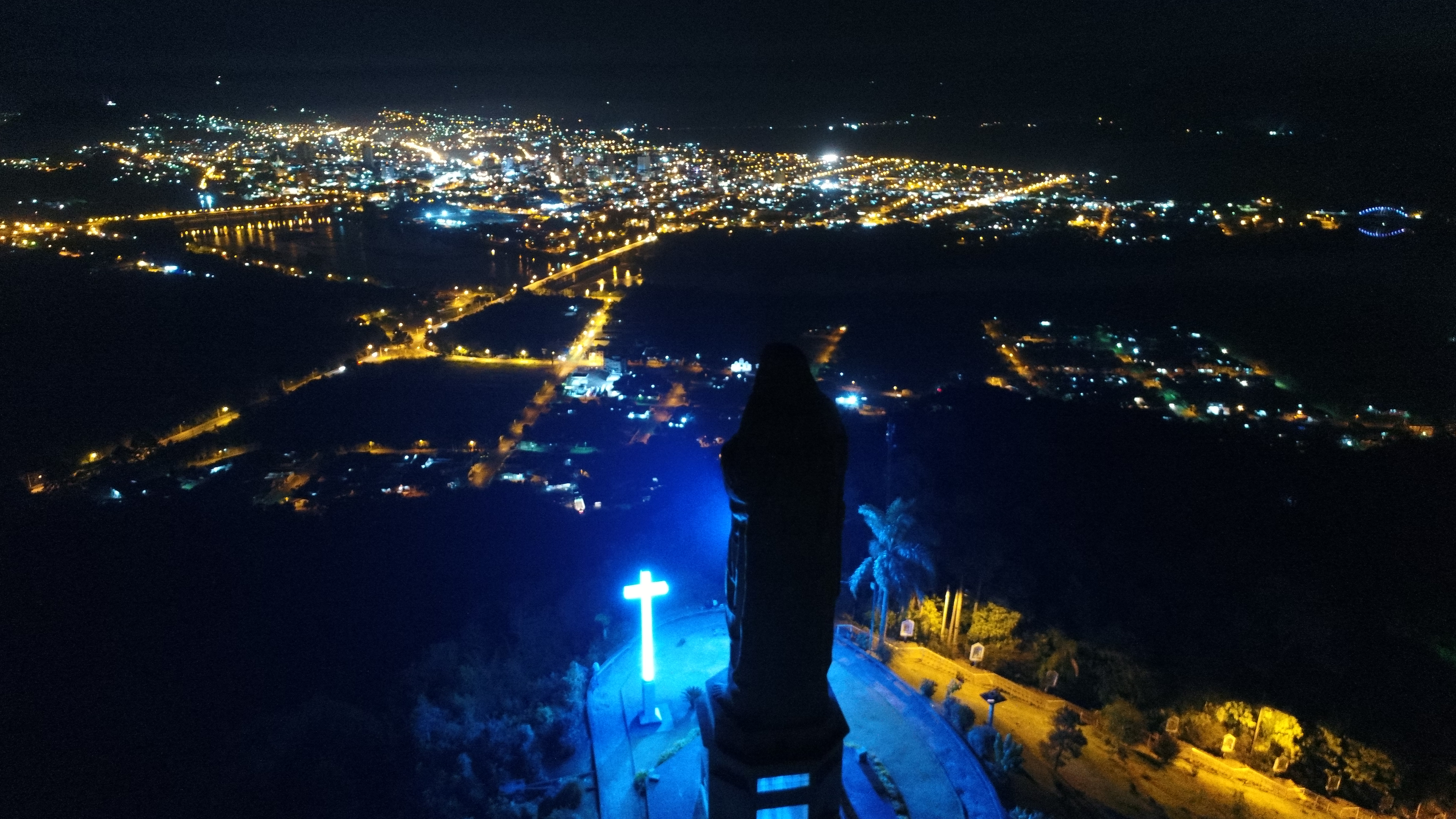 Panorâmica a noite, União da Vitoria e Porto União. Imagem Registrada do alto do morro do Cristo por Anilton B Junior/Marcos Moreira